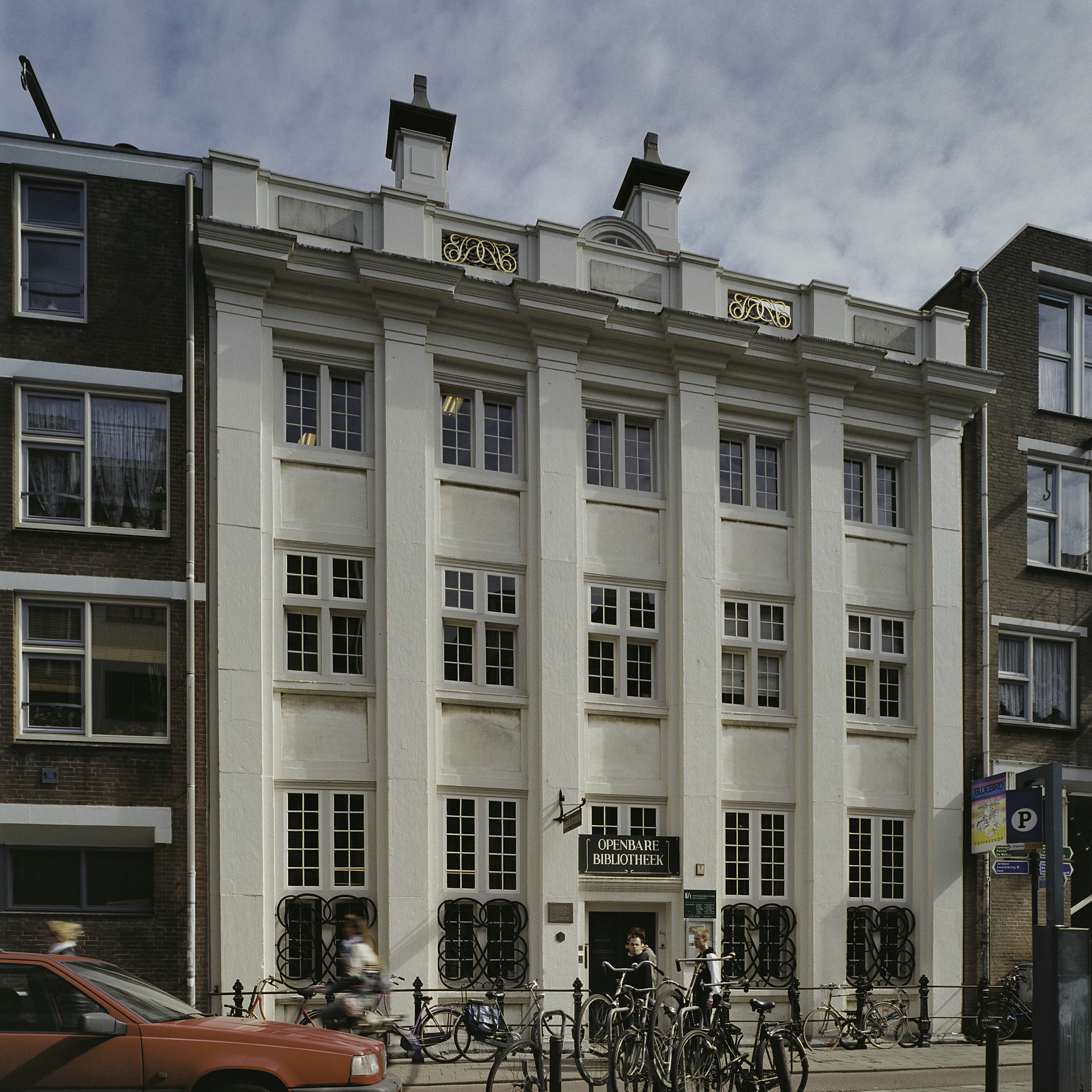 Huis de Pinto: Overzicht zandstenen voorgevel met marmeren platen onder de vensters (opmerking: Gefotografeerd voor Monumenten In Nederland Noord-Holland)